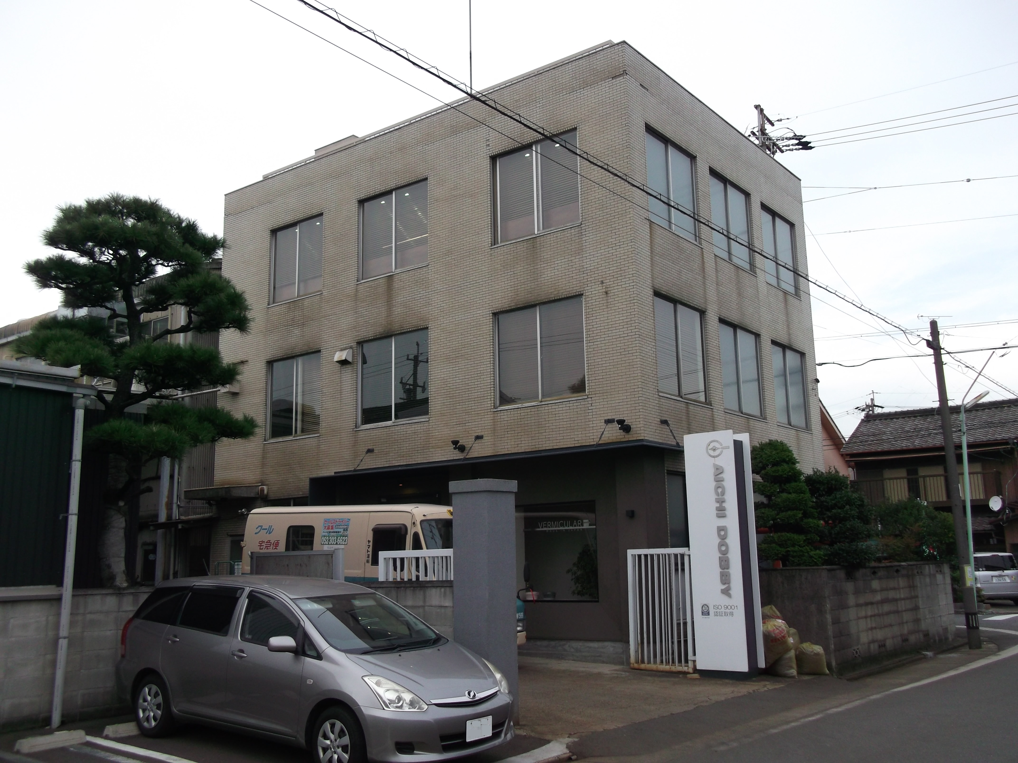 名古屋市中川区宗円町の愛知ドビー本社を東側公道南側より撮影。車のナンバープレートにつき画像修正済